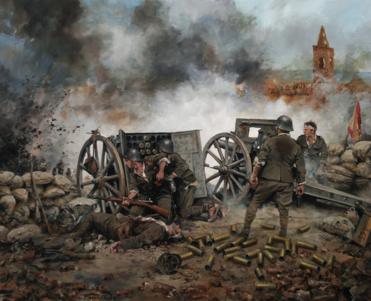 titulo del cuadro "Al pie del cañón", sobre la batalla de Belchite,(Guerra Civil Española 1936-39)